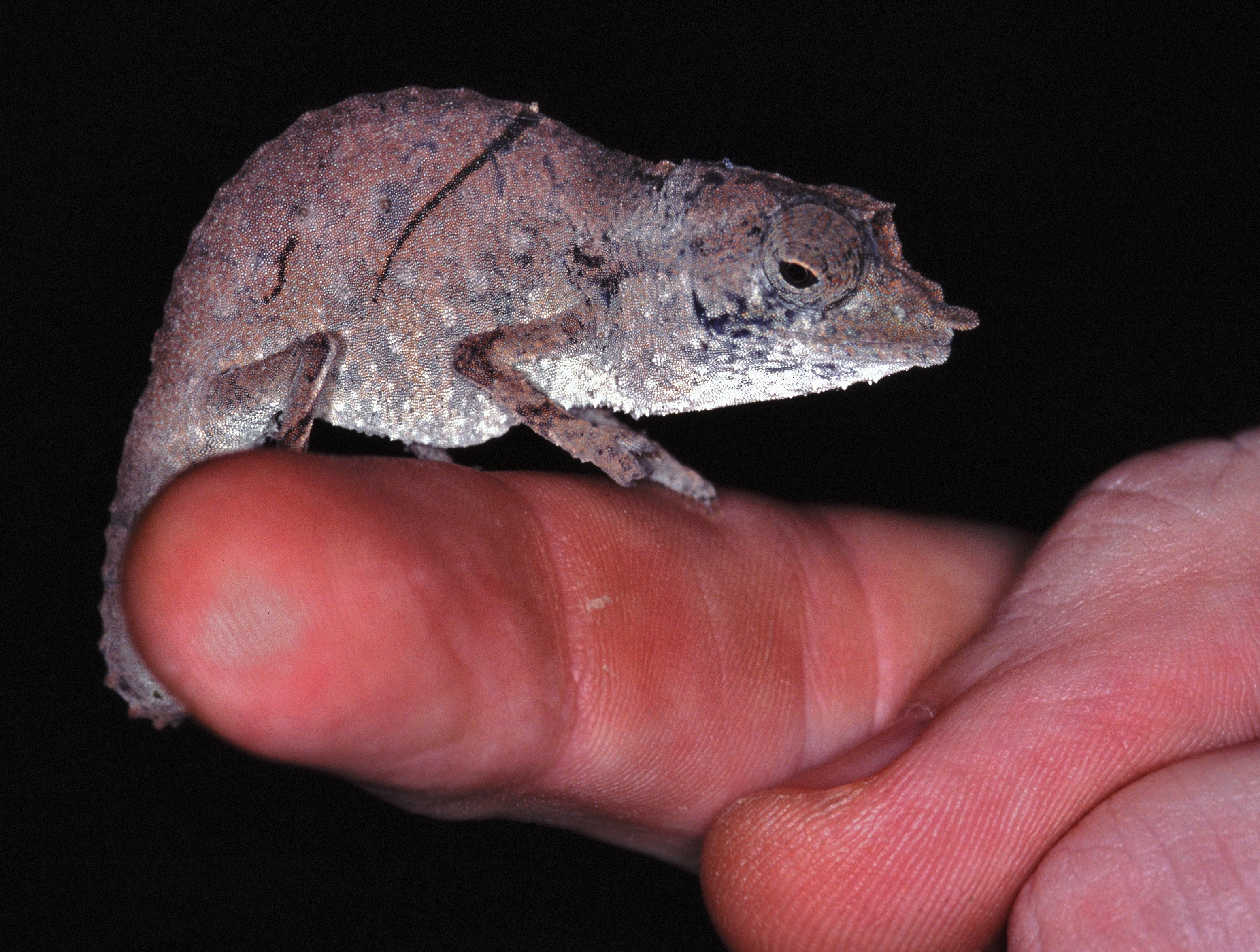 Korup NP, CAMEROON